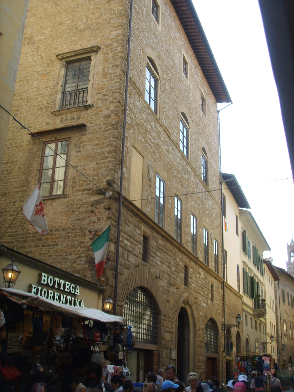 Palazzo peruzzi, facciata